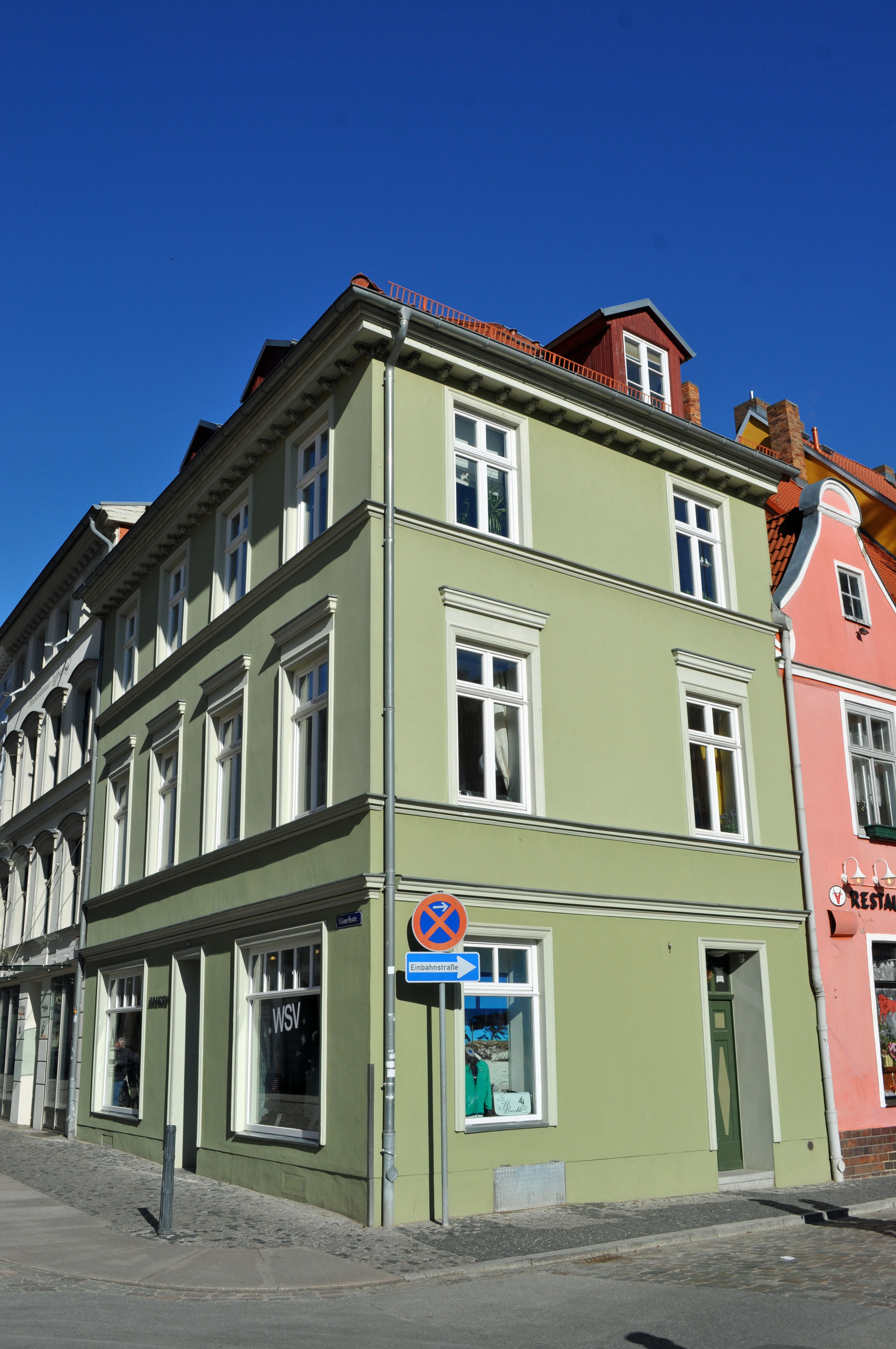 Gebäude bzw. Gebäudedetail in Stralsund. Straße und Hausnummer siehe Dateiname. Das Gebäude ist als Baudenkmal ausgewiesen, siehe dazu die Liste der Baudenkmale in Stralsund.